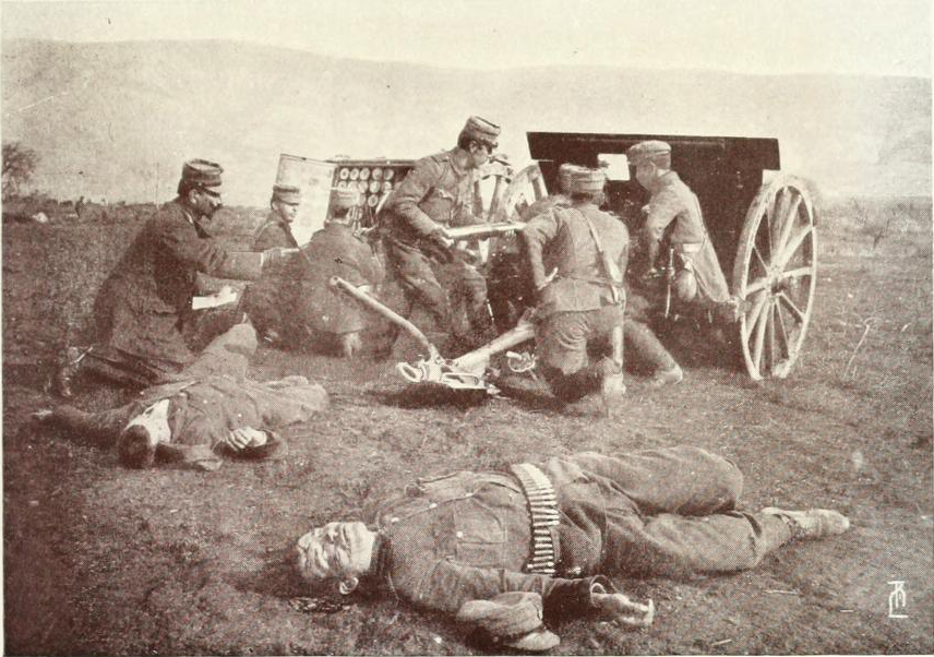 Artillería griega en acción durante las Guerras Balcánicas.